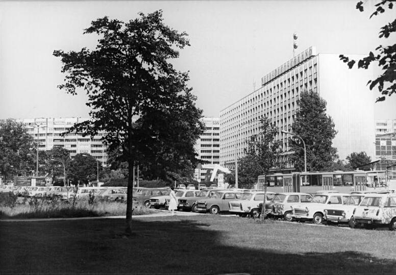 Berlin, Franz-Mehring-Platz, verlagsgebäude "Neues Deutschland" ADN-ZB 6-8-81-Link-Str.-Berlin-rw Franz-Mehring-Platz mit dem Gebäude des Zentralorgans der Sozialistischen Einheitspartei Deutschlands "Neues Deutschland" ADN-Zentralbild Berlin - DDR